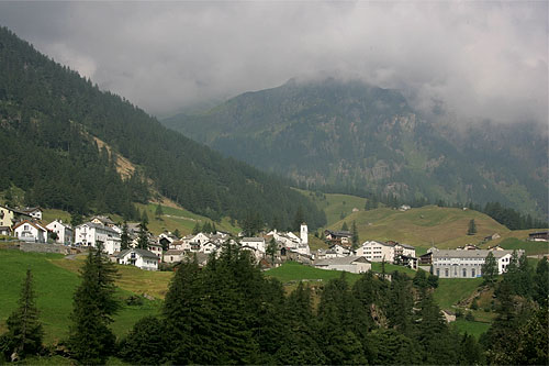 Simplon-Dorf